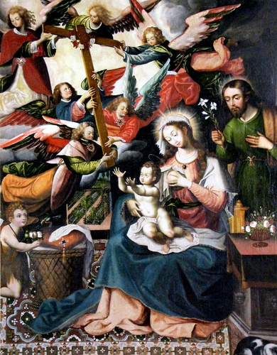 Visión de la Cruz, óleo sobre lienzo, Cuzco, Convento Franciscano de la Recoleta